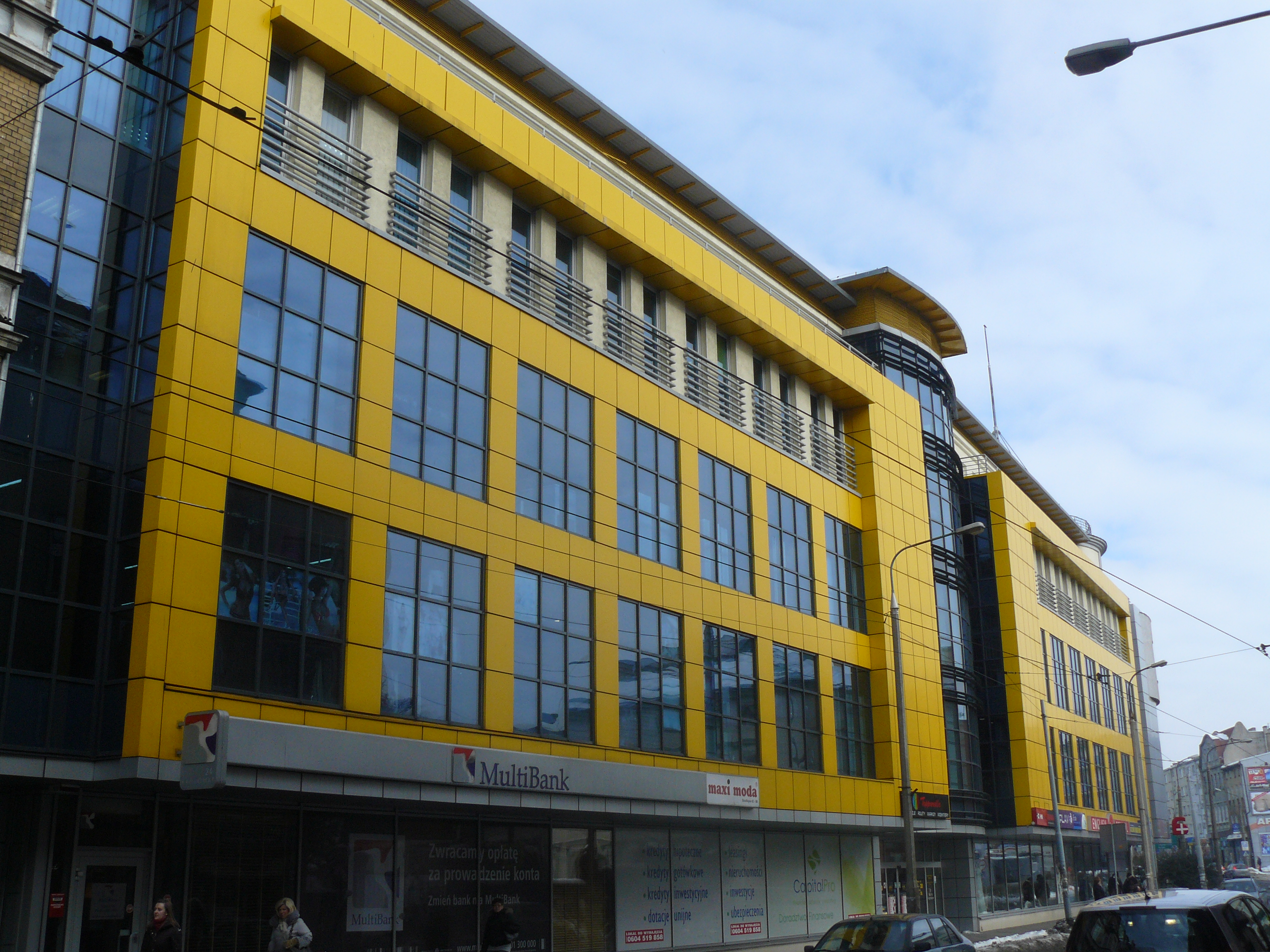 Gorzów Wielkopolski, ul. Sikorskiego 111 - Multi Bank